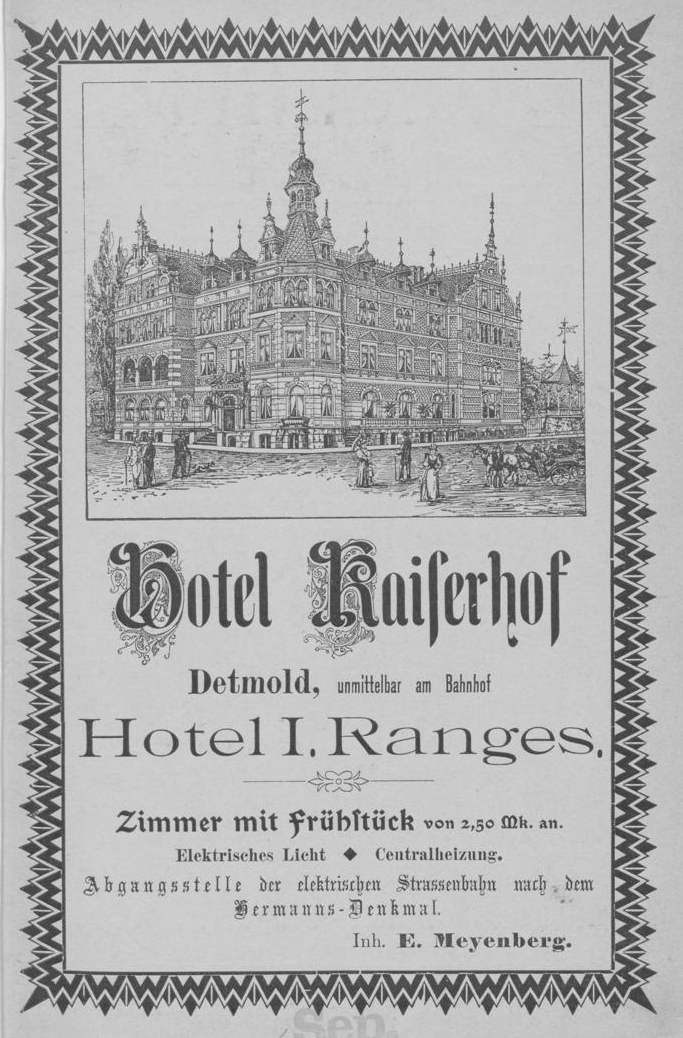 Werbeanzeige des Hotels Kaiserhof im Adressbuch für das Fürstenthum Lippe 1901